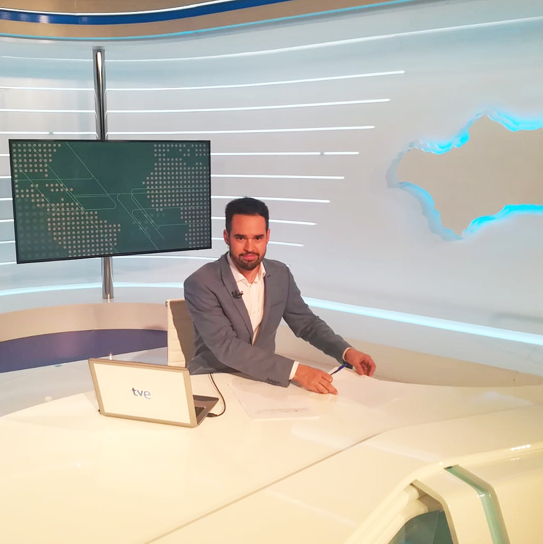 Adrián Arnau, periodista, reportero y presentador de televisión en el plató de RTVE Andalucía en 2018.